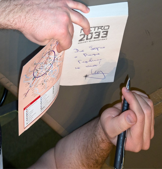 Konvencija Kontakt, koja je spojila 34. SFeraKon i 34. Eurocon u Zagrebu